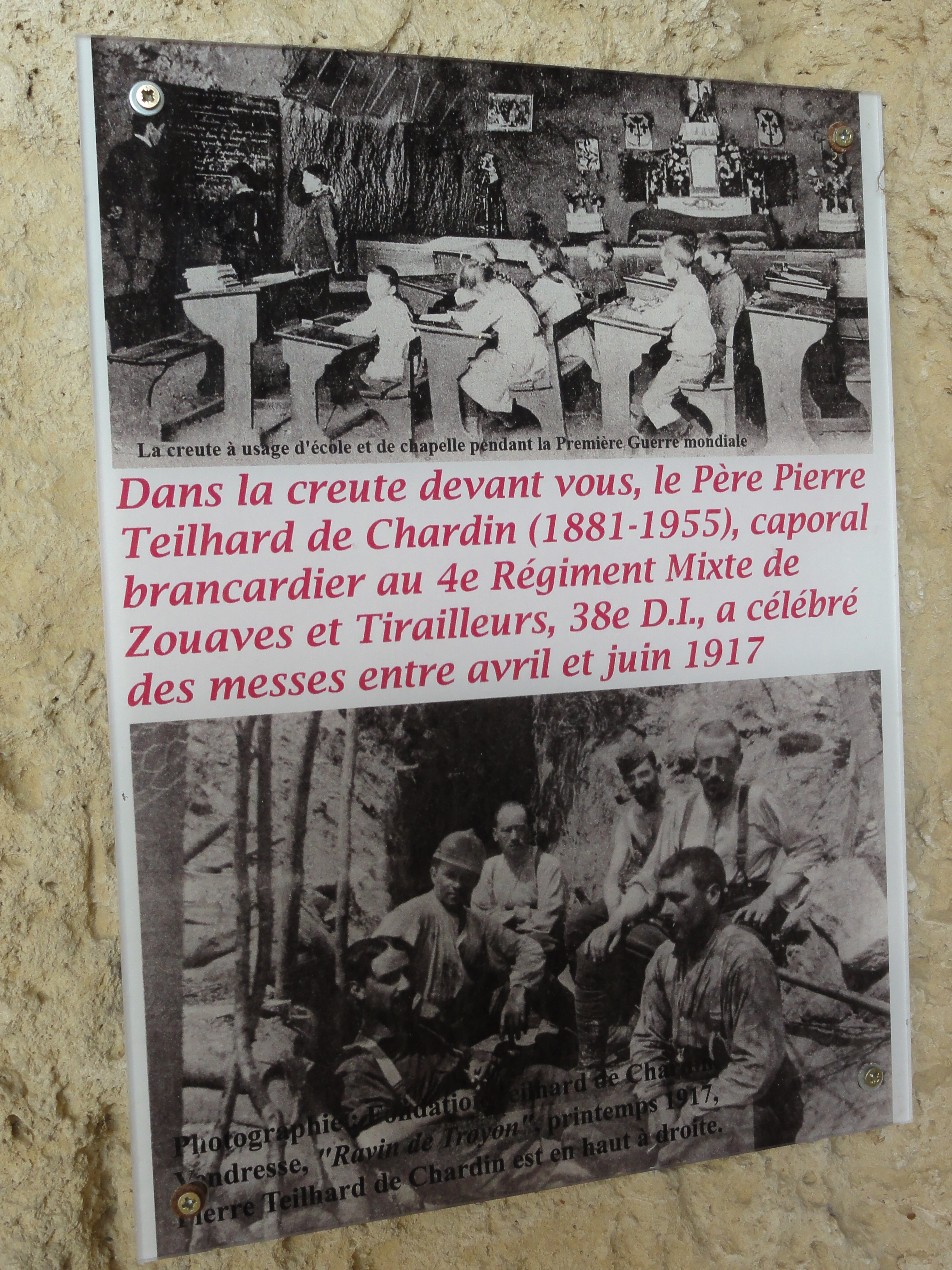 Paissy (Aisne) creute mémorial de guerre Teilhard de Chardin